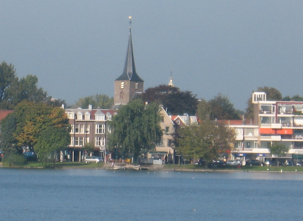 Hillegondakerk, Hillegersberg